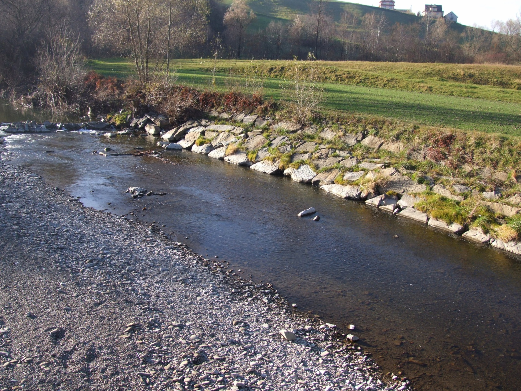 Łososina w Piekiełku (przy niskim stanie wody)